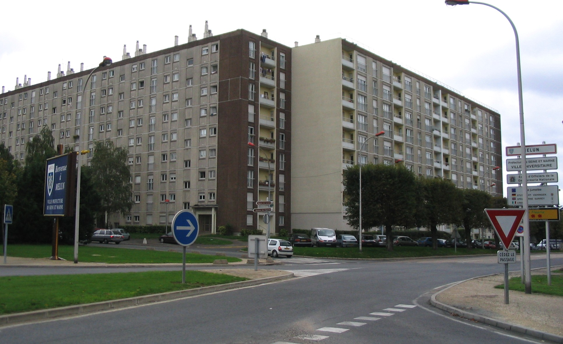 Immeubles du quartier de Montaigu, le long de l'Avenue Georges Pompidou, près de la Route Nationale 105.